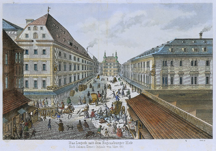 Das Lugeck mit dem Regensburger Hof. Urheber: Johann Wenzel Zinke (1797-1858) nach Salomon Kleiner (1700-1761). Farbradierung, 23,6 cm x 34 cm (Pl.), 27 cm x 36,2 cm (Bl.) Beschreibung übernommen vom Historischen Museum der Stadt Wien (Inv. Nr. 70.297). [1]